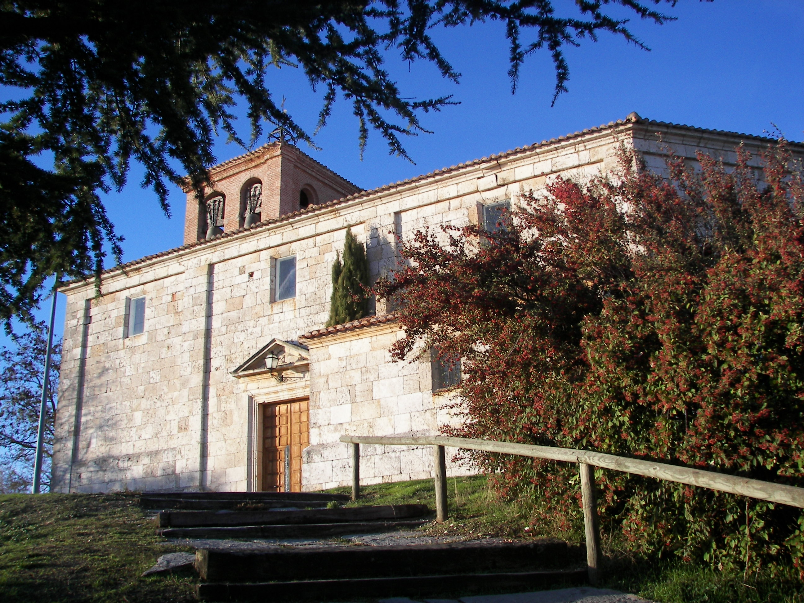 Villariezo, municipio y localidad de la provincia de Burgos, comunidad autónoma de Castilla y León (España), comarca de Alfoz de Burgos.